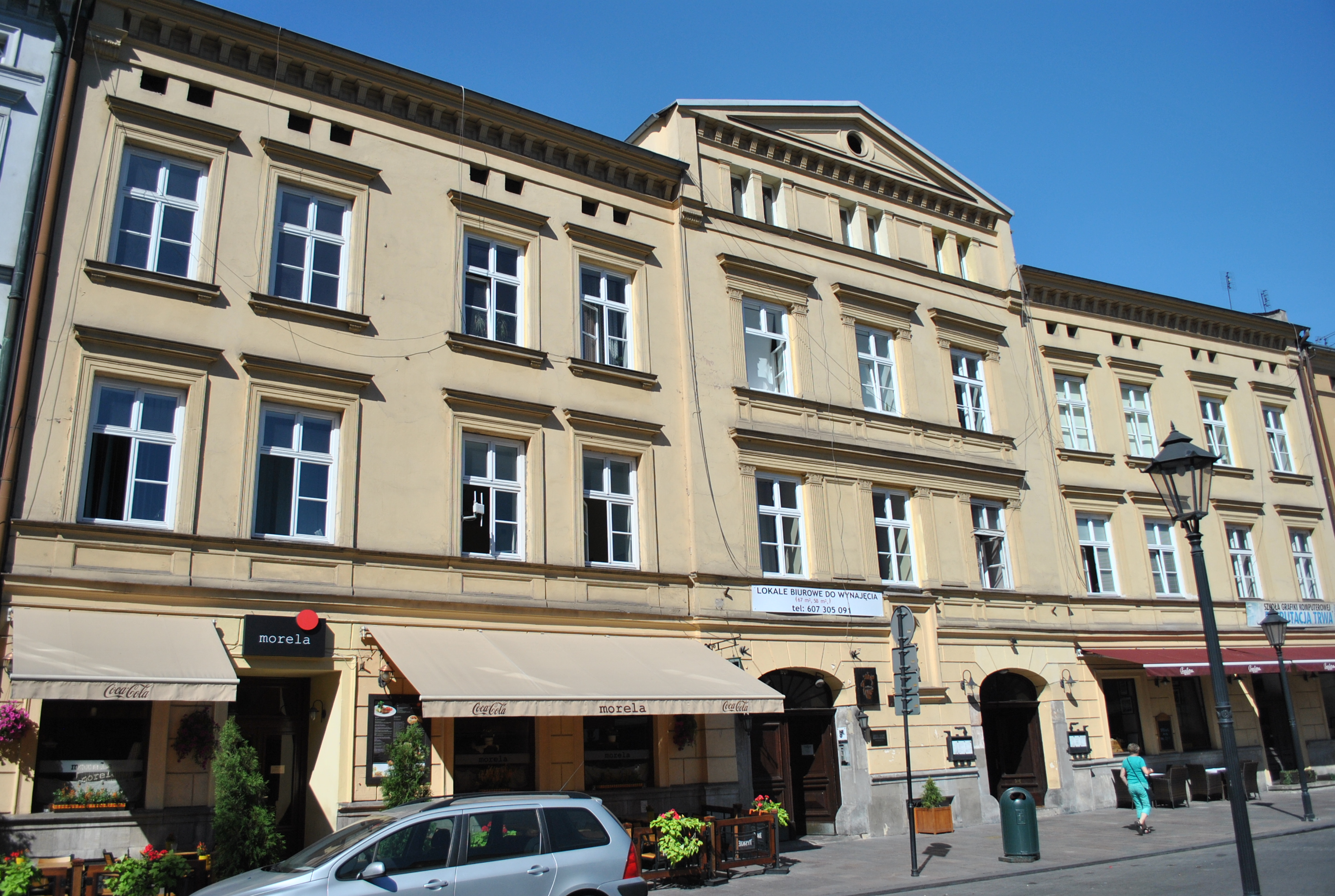 Kamienica przy ulicy Stolarskiej 13 w Krakowie, widok od frontu.